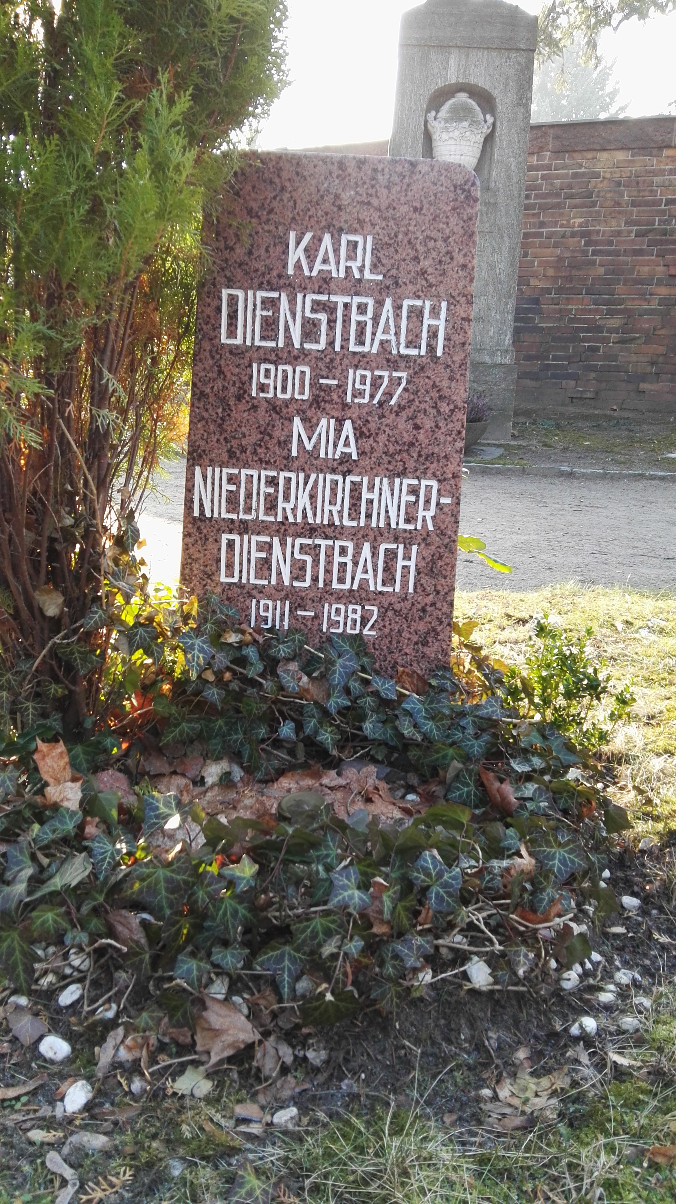 Grab von Karl Dienstbach und Mia Niederkirchner-Dienstbach in der Grabanlage Pergolenweg auf dem Sozialistenfriedhof des Zentralfriedhofs Friedrichsfelde